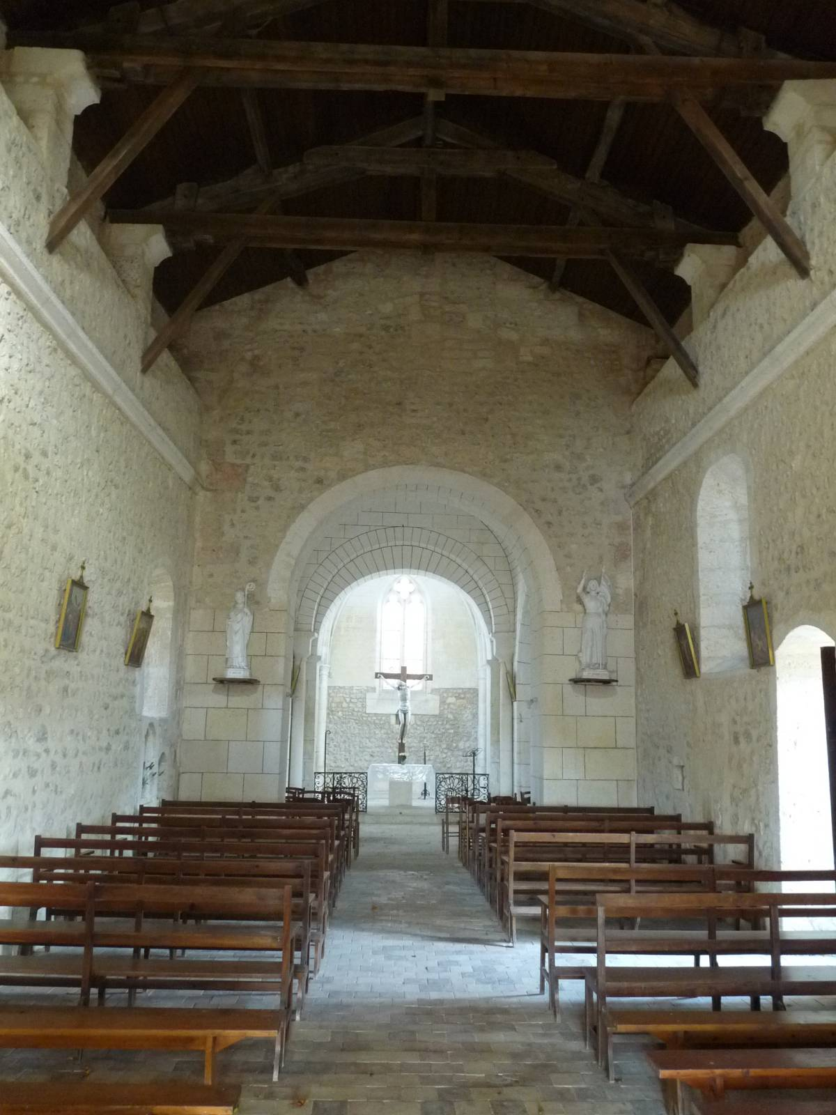 église d'Aubeville (16), France